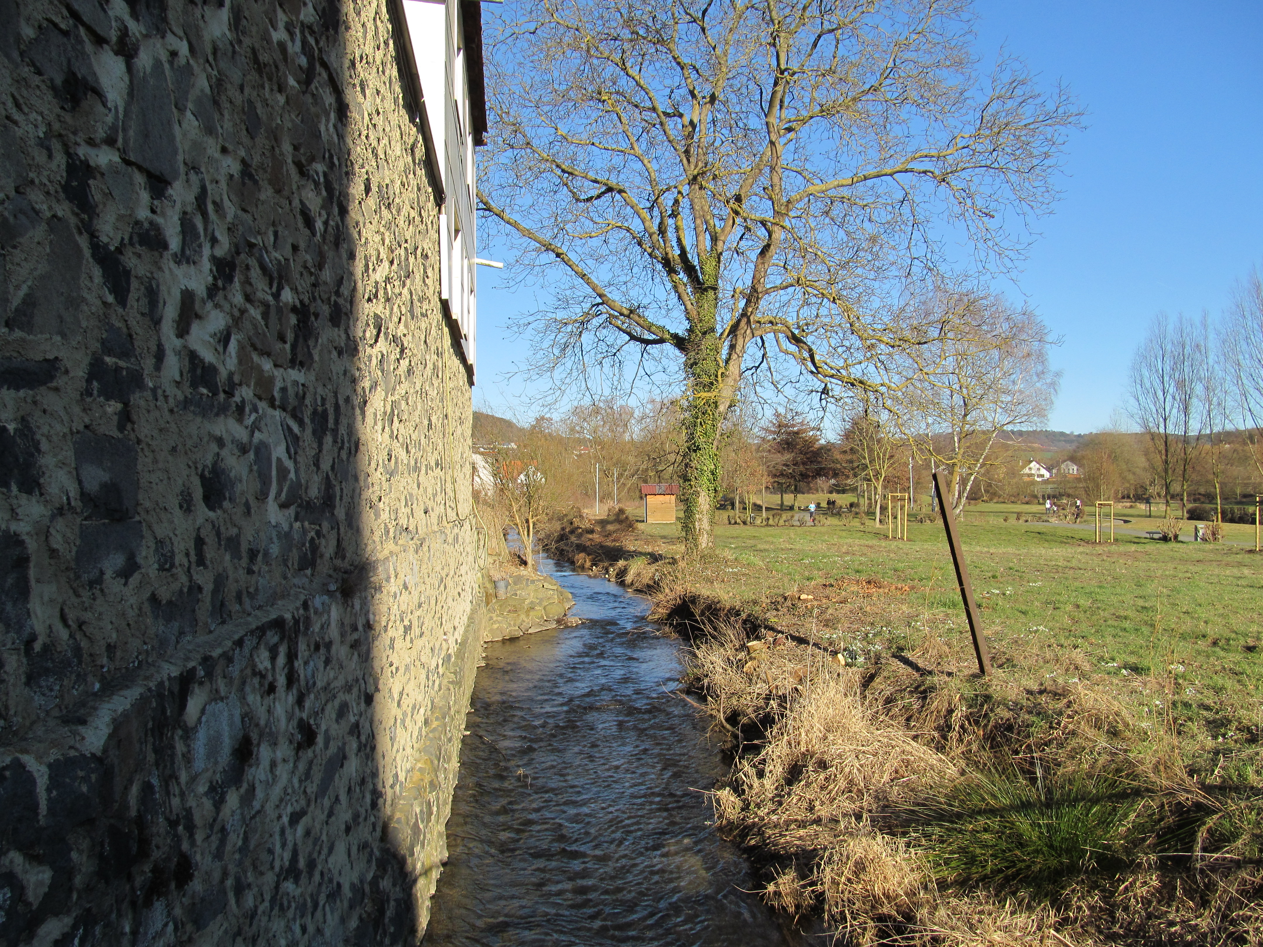 der Mühlengraben von Homberg